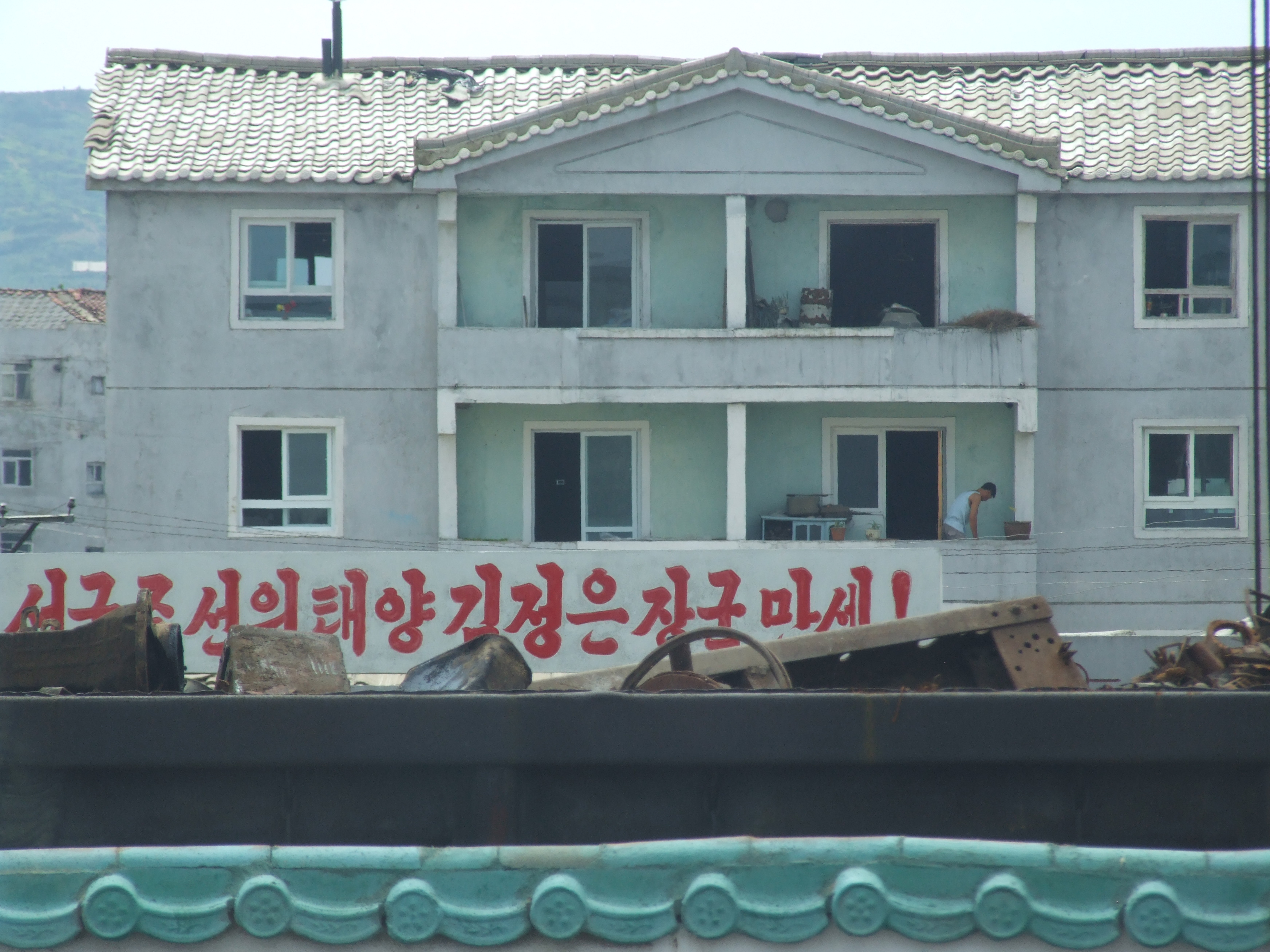 Wohnhaus in Nordkorea